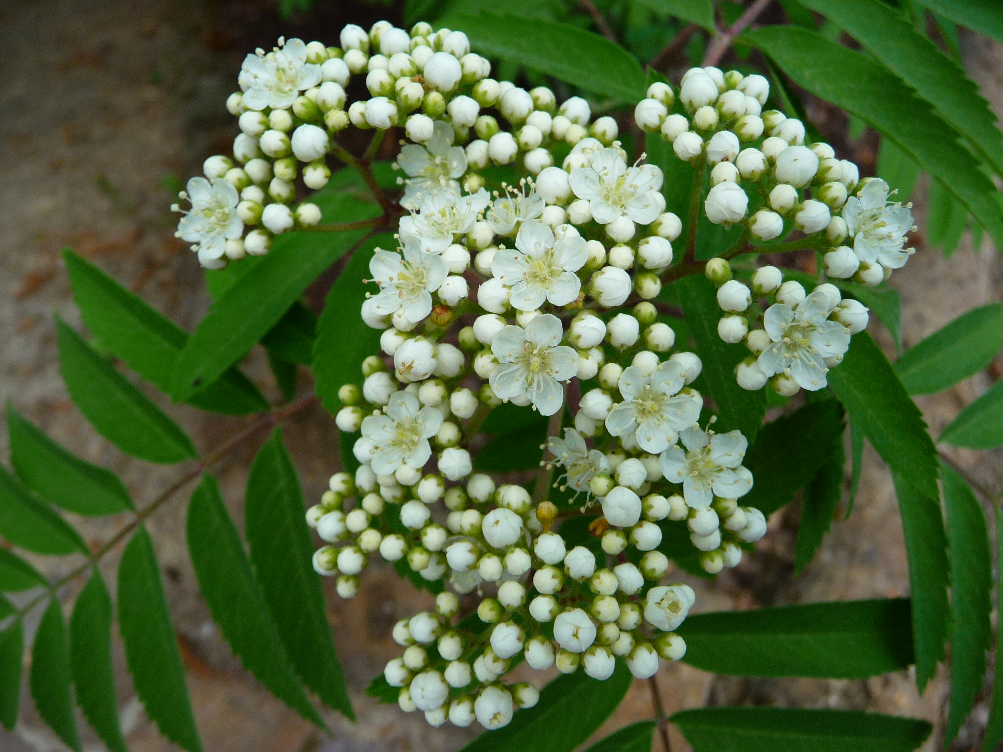 Blüten der Eberesche (Sorbus aucuparia)